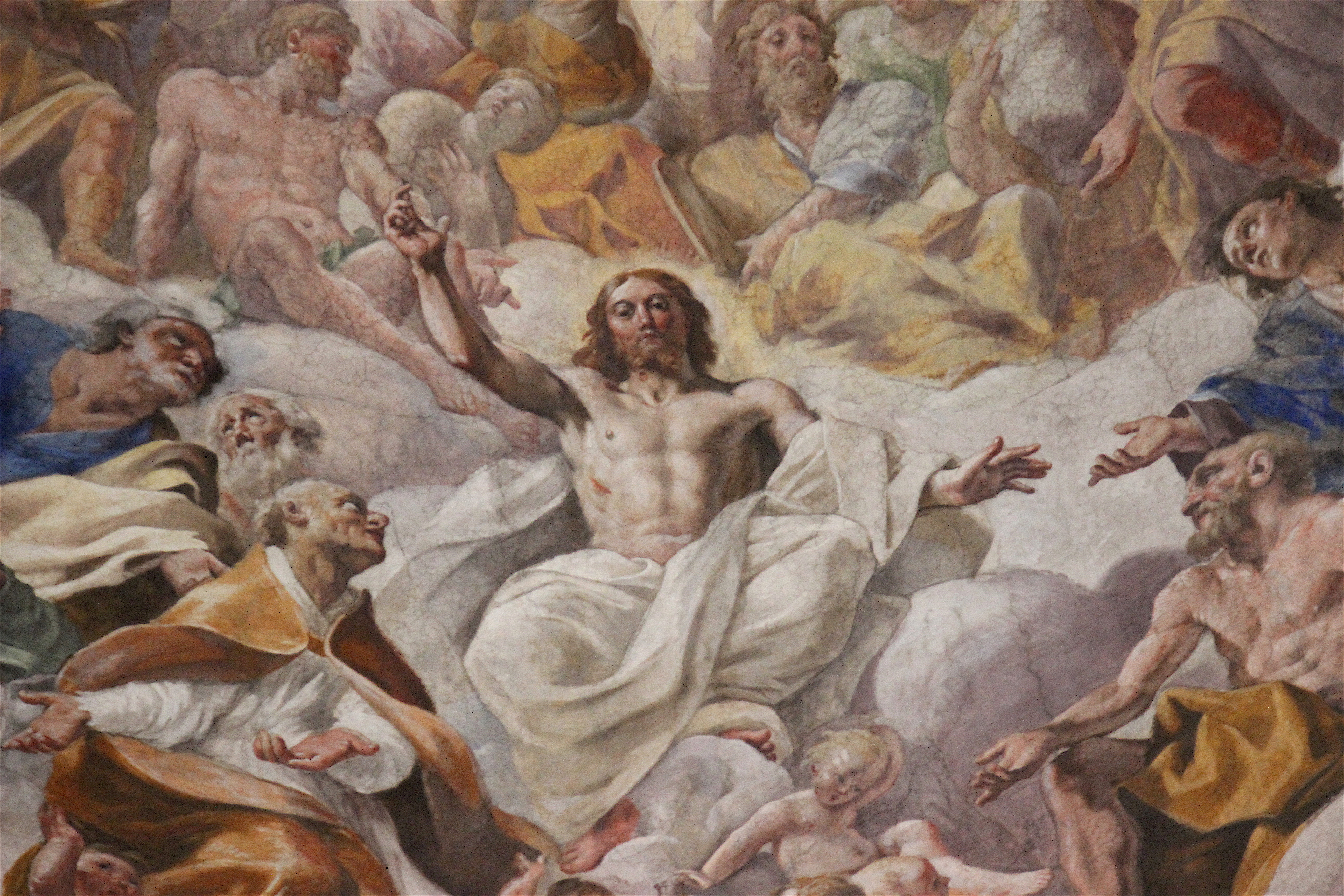 Giovanni Lanfranco. La Gloria. Nápoles. Capilla del Tesoro de San Gennaro.